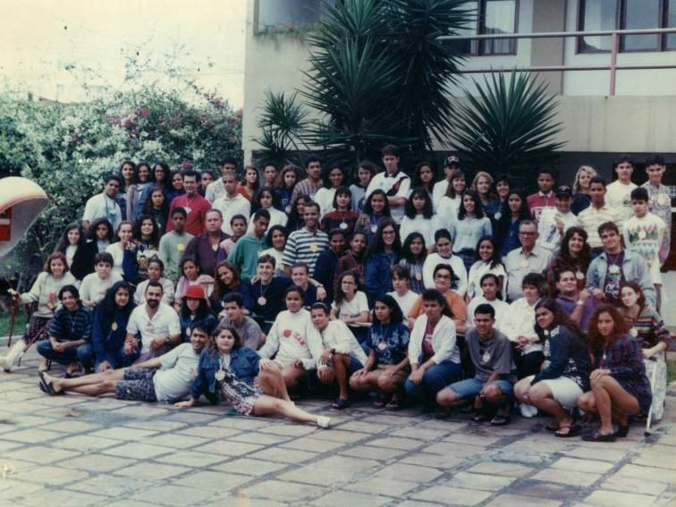 1º Escalada de Jacobina.